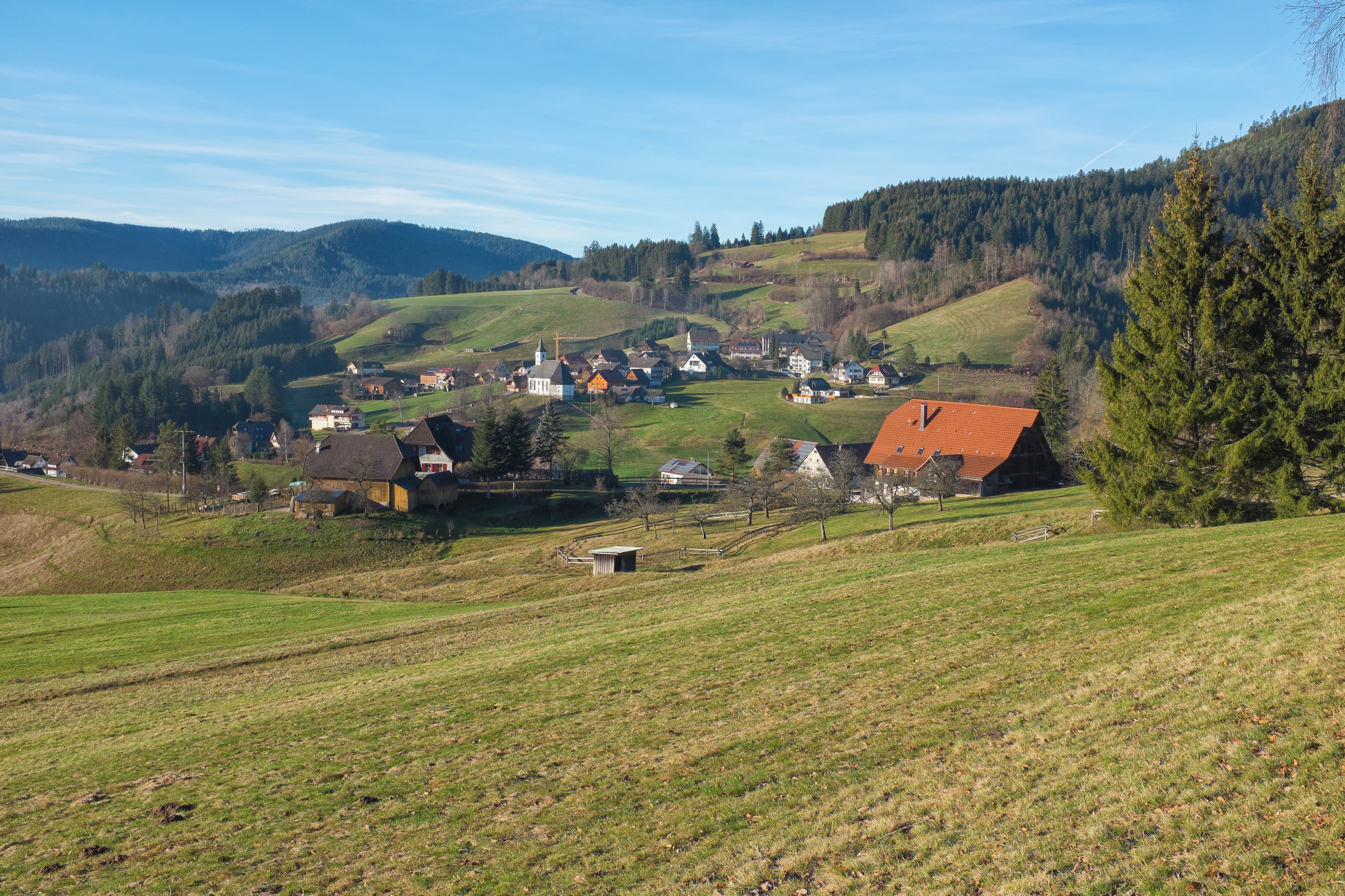 Blick über Baiersbronner Ortsteil Schwarzenberg